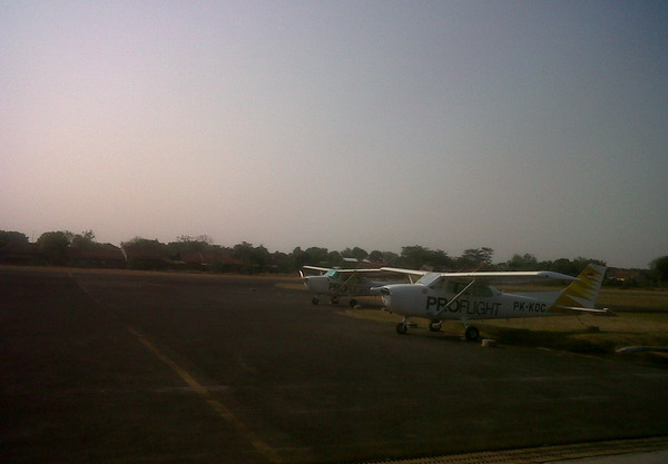 Pangkalan Udara TNI AU Penggung, Kecamatan Harjamukti, Kota Cirebon, Provinsi Jawa Barat, Indonesia.